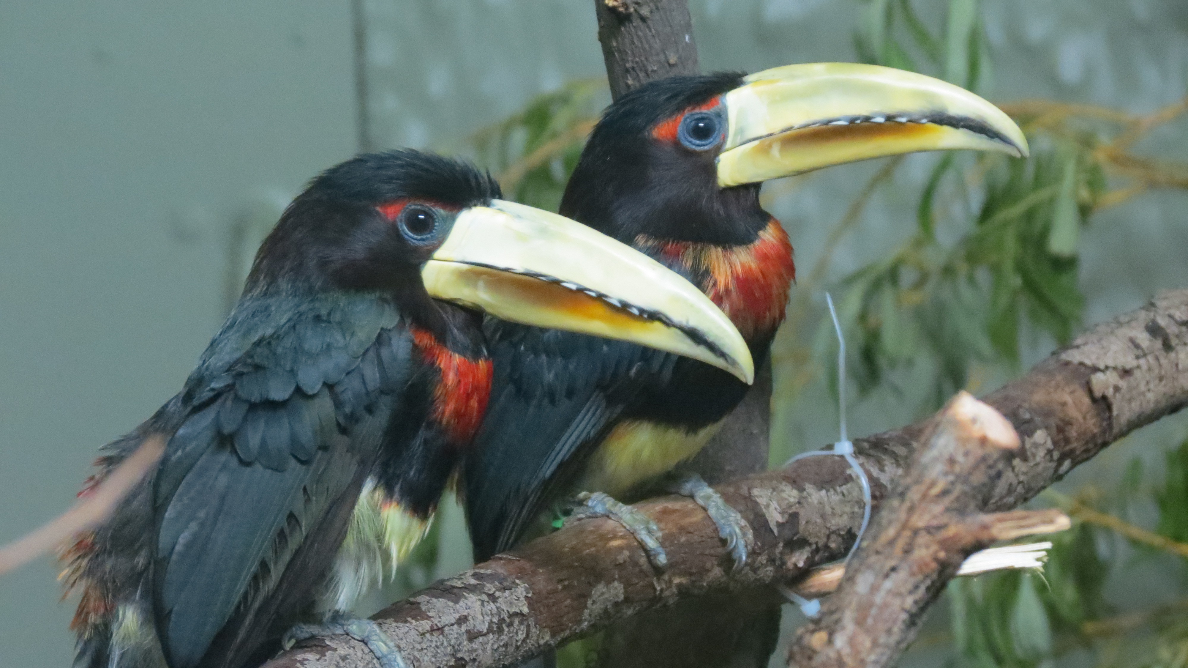 Assiniboine Park Zoo, Winnipeg, Manitoba, Canada